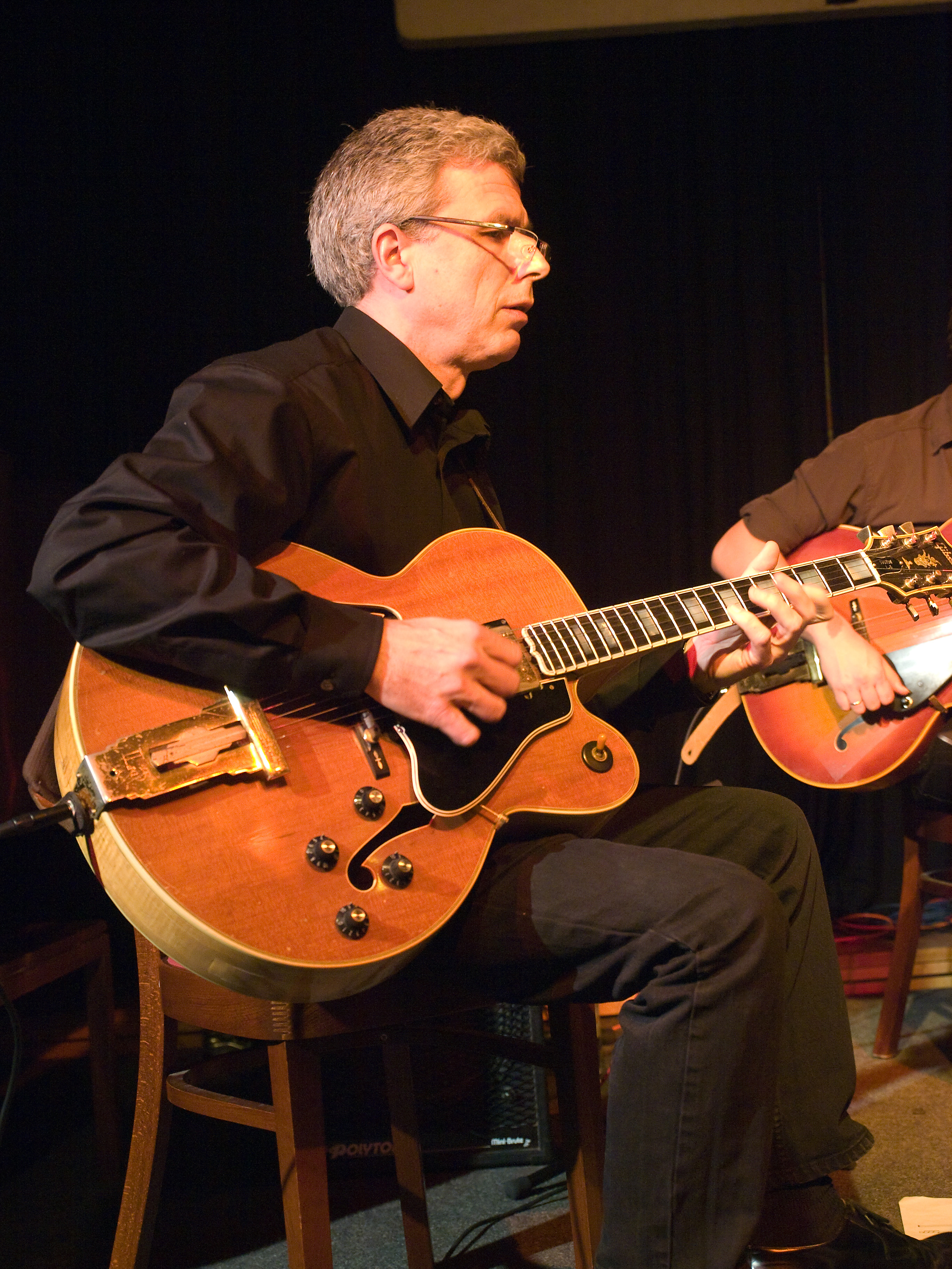 Helmut Kagerer, jazz guitarist, picture taken in Jazz club "Unterfahrt" in Munich/Germany